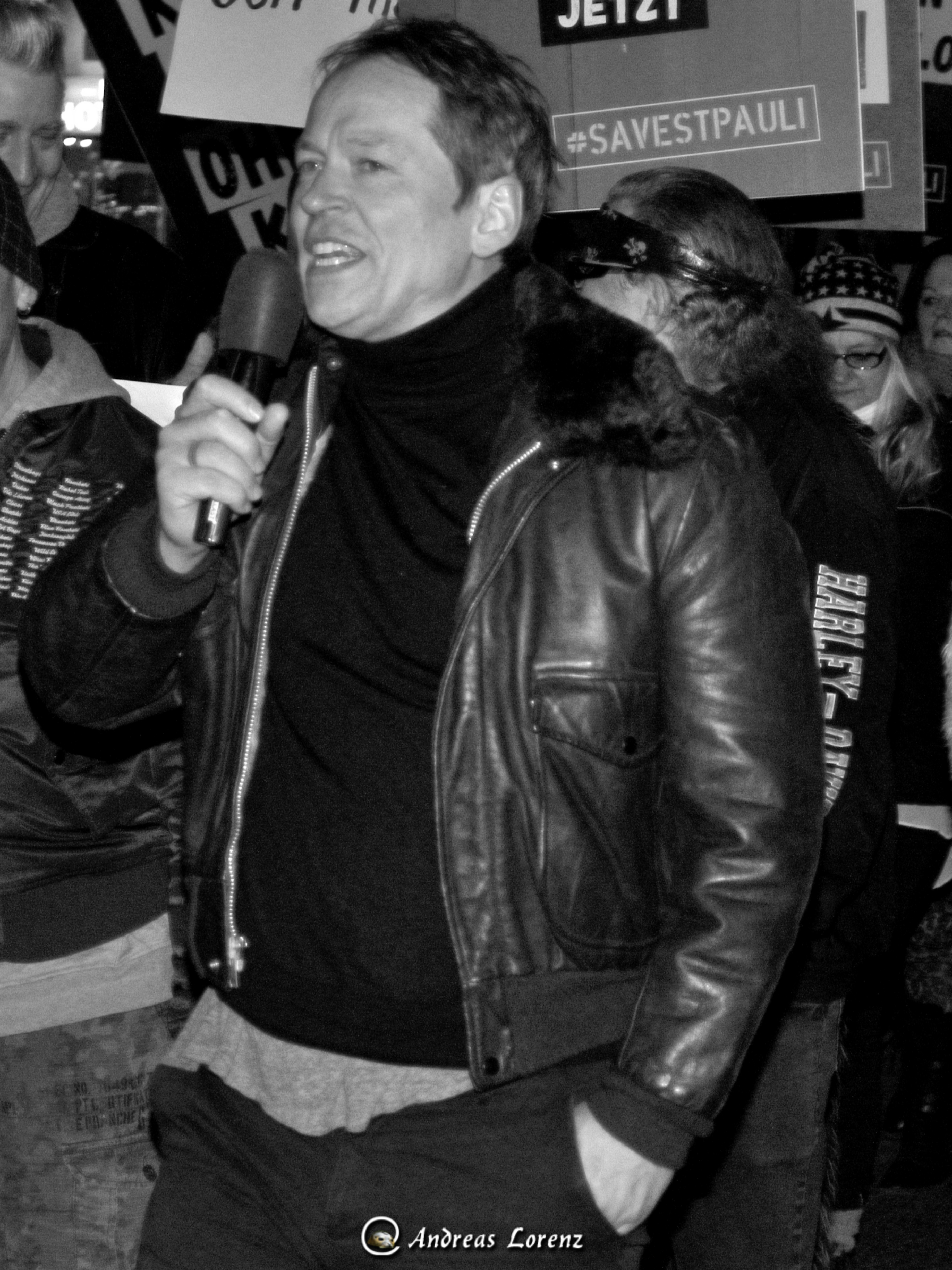 Als Organisator und Sprecher einer Demonstration auf St.Pauli